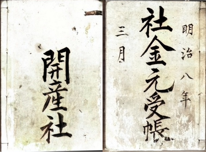 明治８年開産社社金元受帳